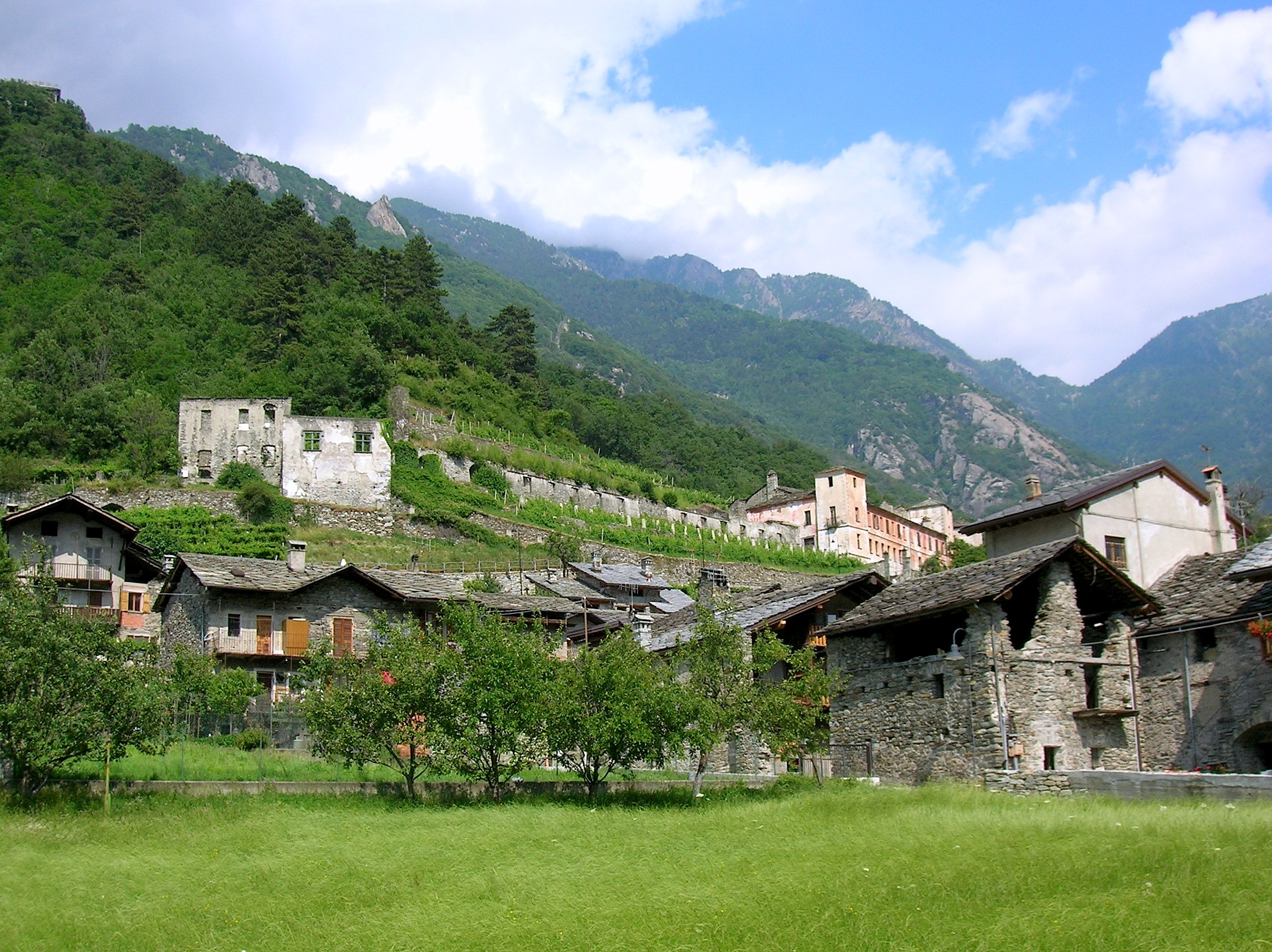 Casaforte della Costa (sulla sinistra) e Castello inferiore di Arnad (sulla destra). Arnad, Valle d'Aosta, Italia.